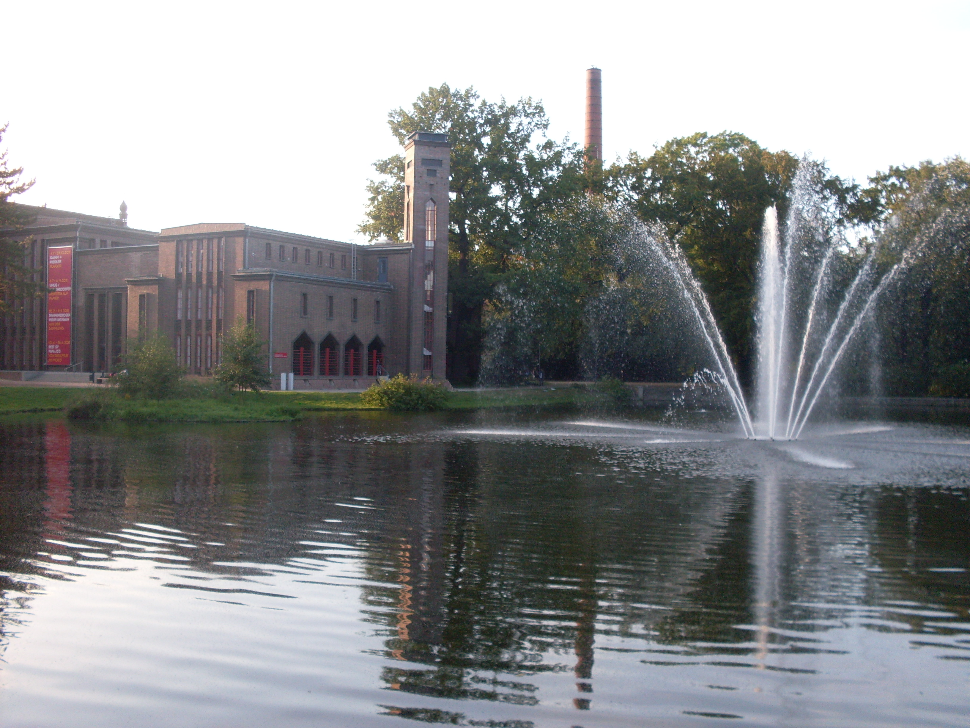 DKW mit Amtsteich